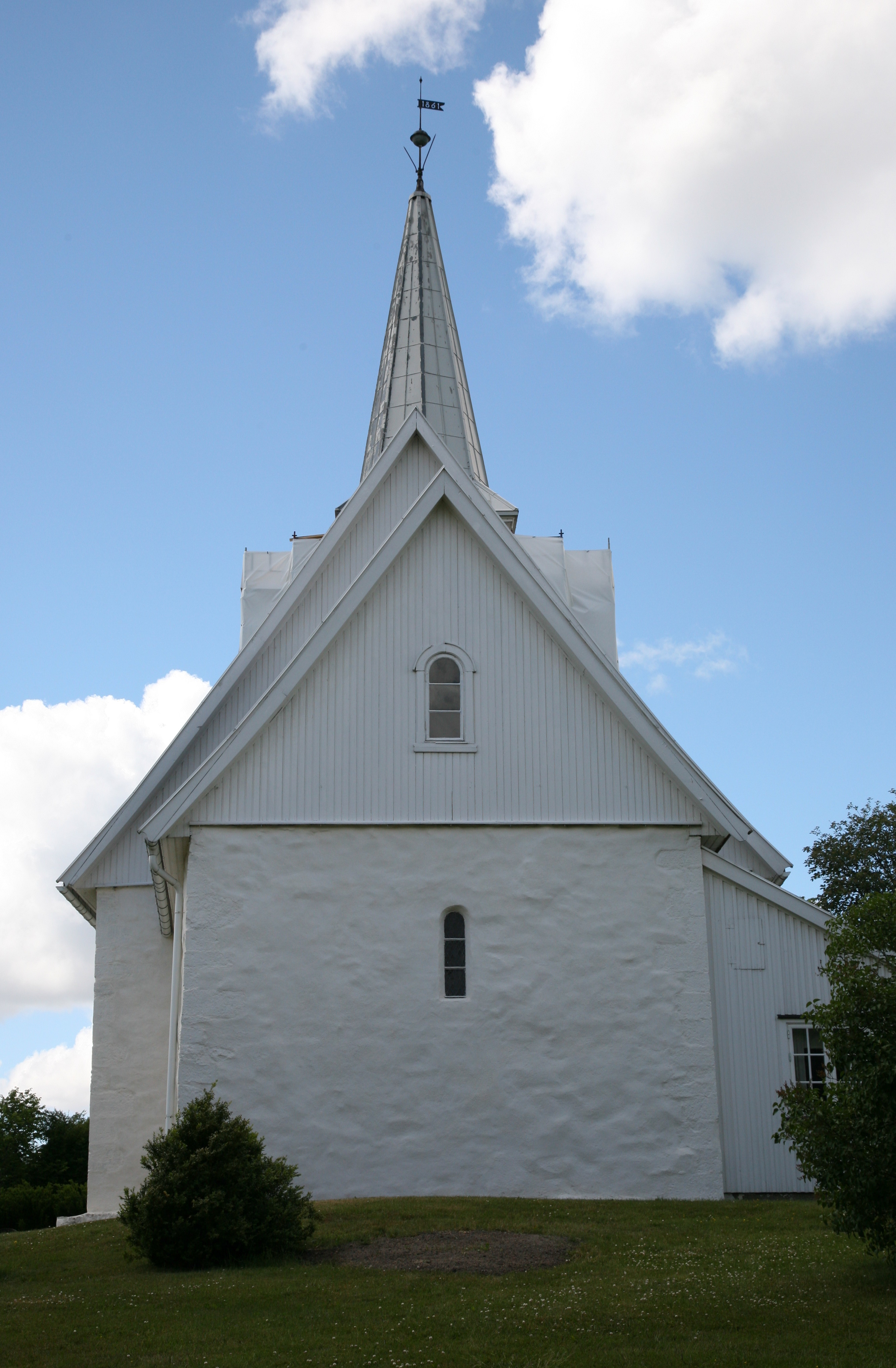 Lørenskog church from 1150-1250 in Lørenskog, Akershus, Norway